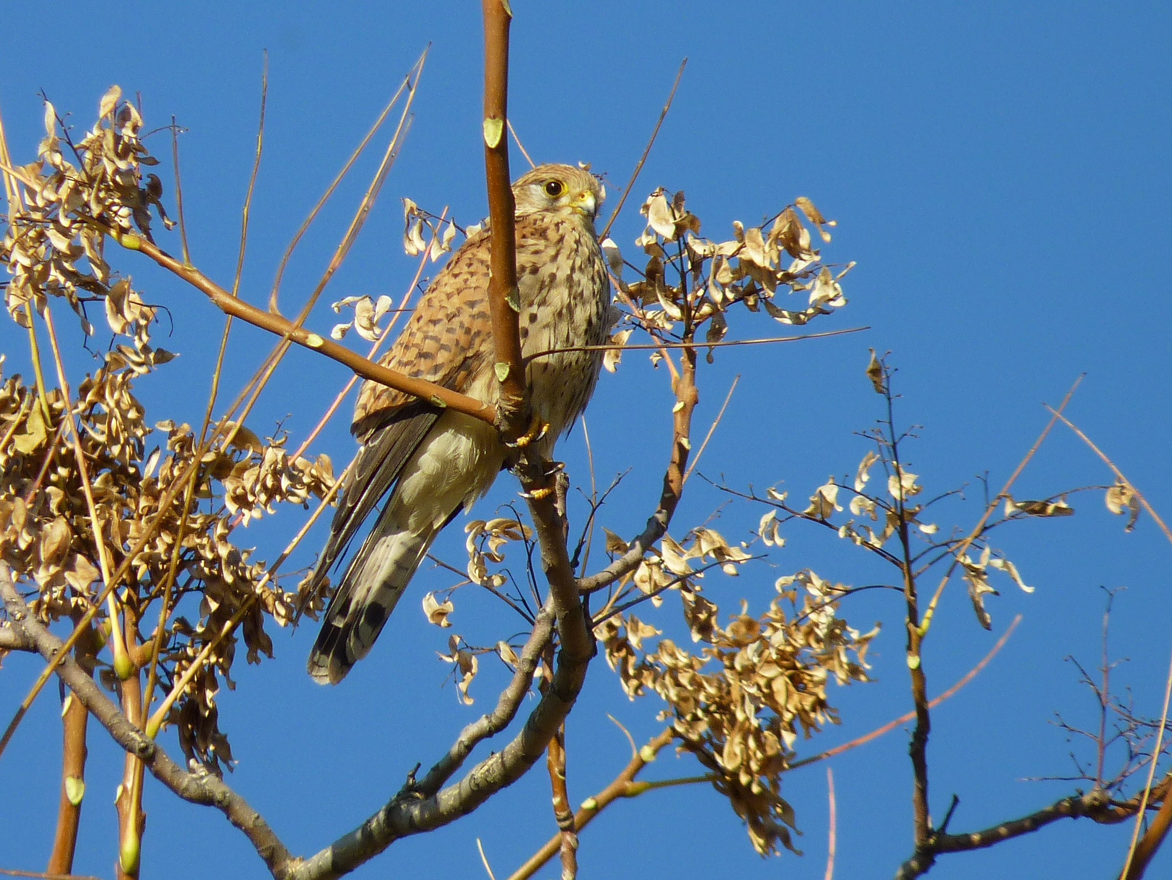 Turmfalke (Falco tinnunculus)